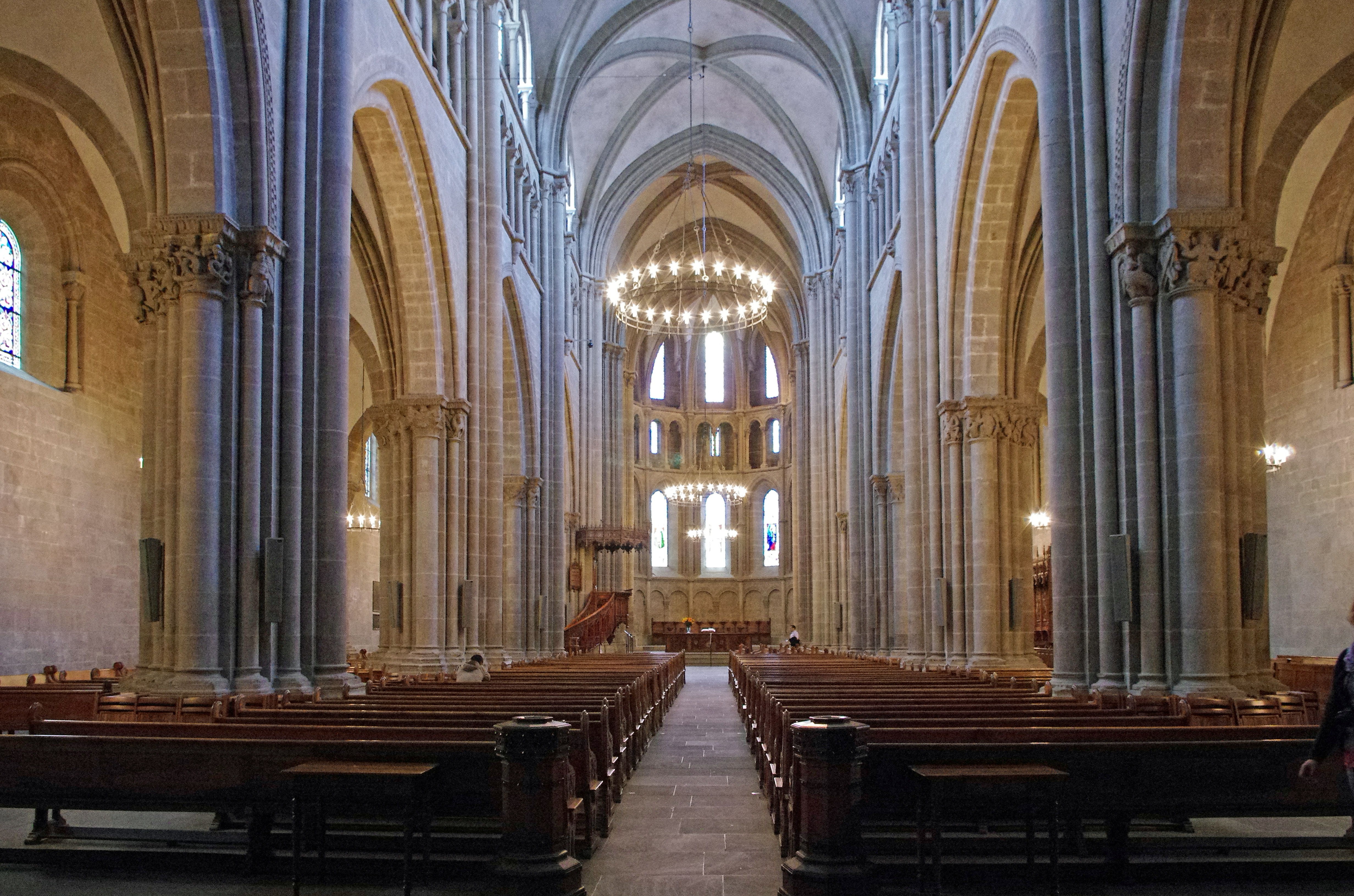 La Cathédrale Saint-Pierre. C'est l'église protestante principale de Genève. La construction commence en 1160 et dure plus d'un siècle. Au XVI ème siècle, la Réforme vide l'édifice de tout ornement. La façade néoclassique date du XVII ème siècle. The Cathedral of St. Peter. This is the main Protestant church in Geneva. Construction begins in 1160 and lasts for more than a century. In the sixteenth century the Reformation the building empty of decoration. The neoclassical facade dates from the seventeenth century.